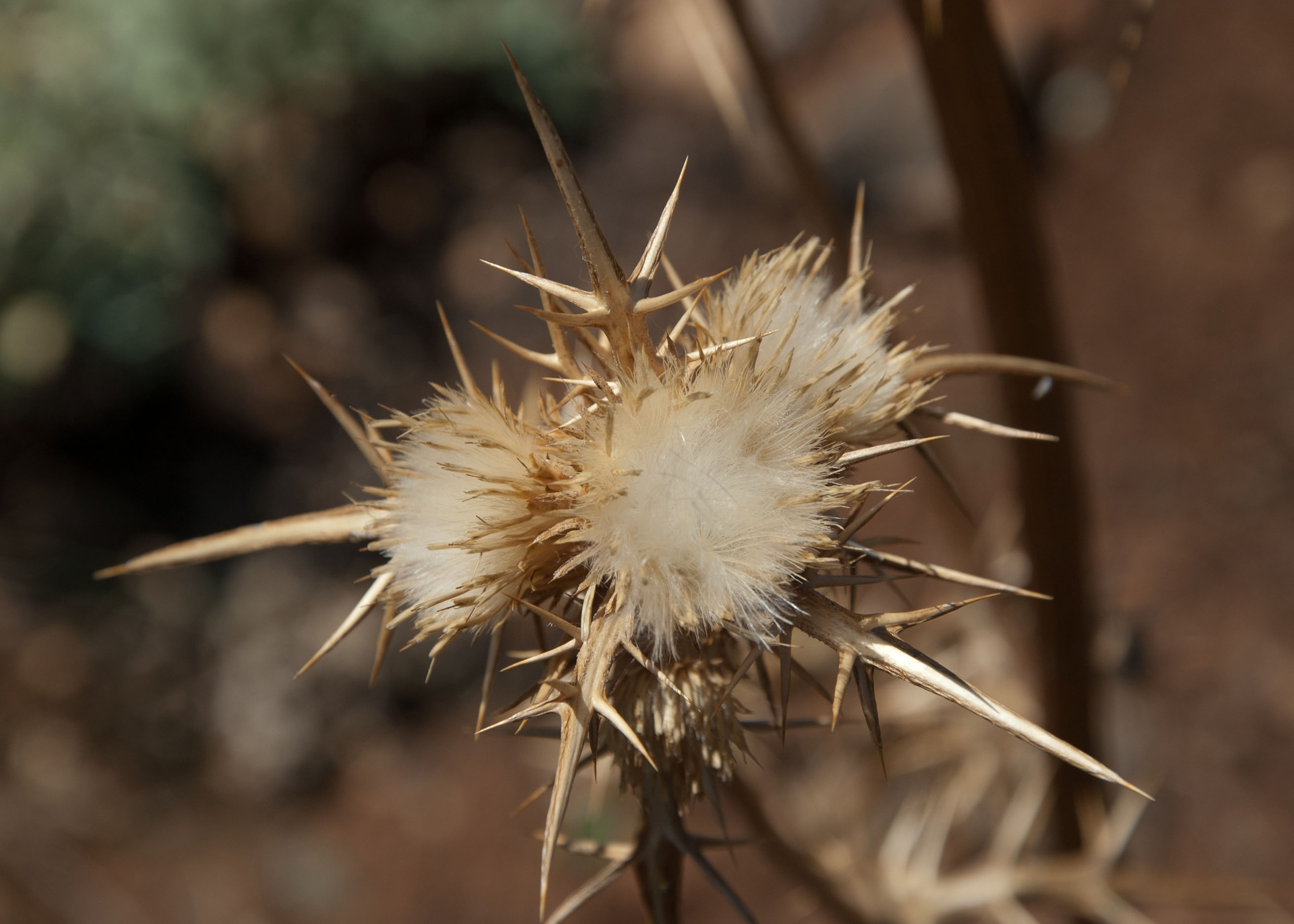 Notobasis syriaca (L.) Guss. - aspetto estivo Riserva naturale Monte Pellegrino